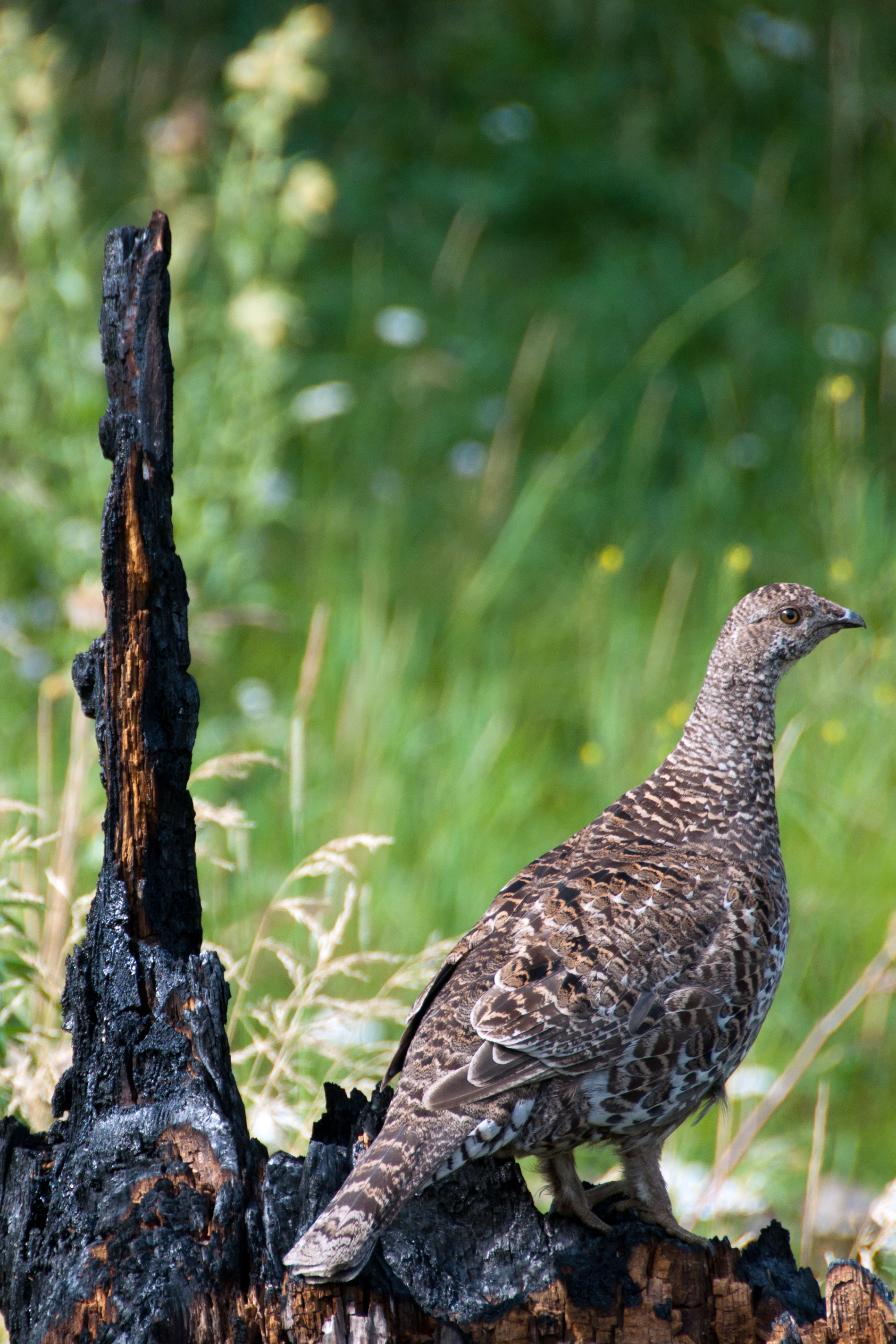 dusky grouse Dendragapus obscurus